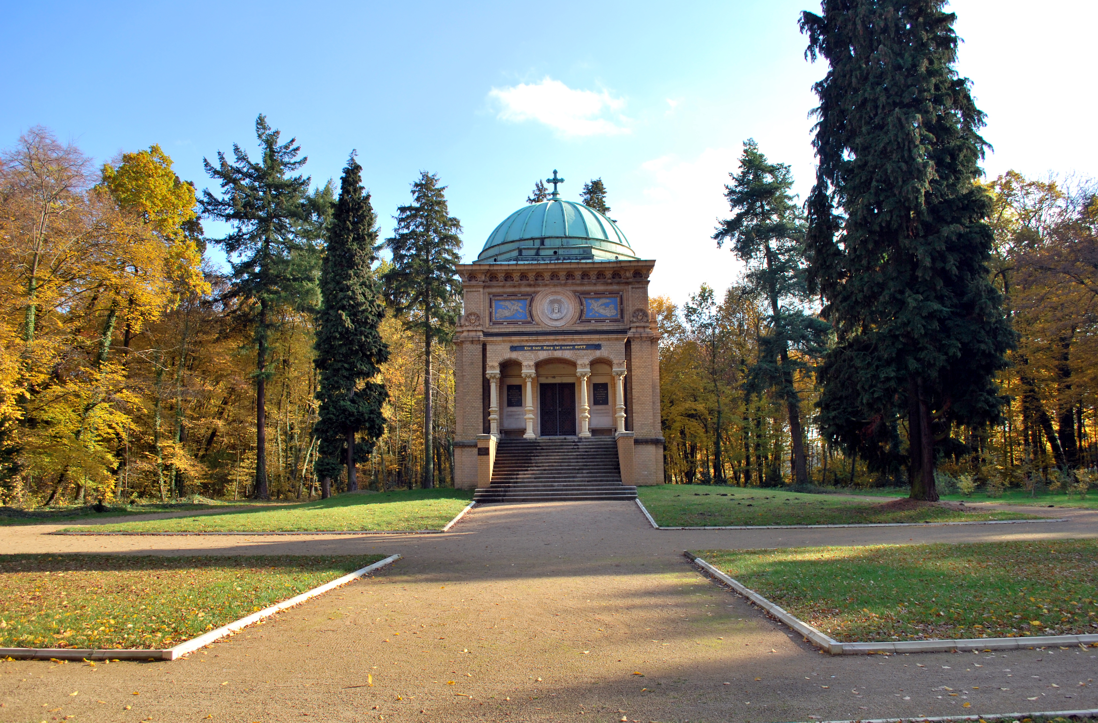 Mausoluem im Stadtpark von Tangerhütte